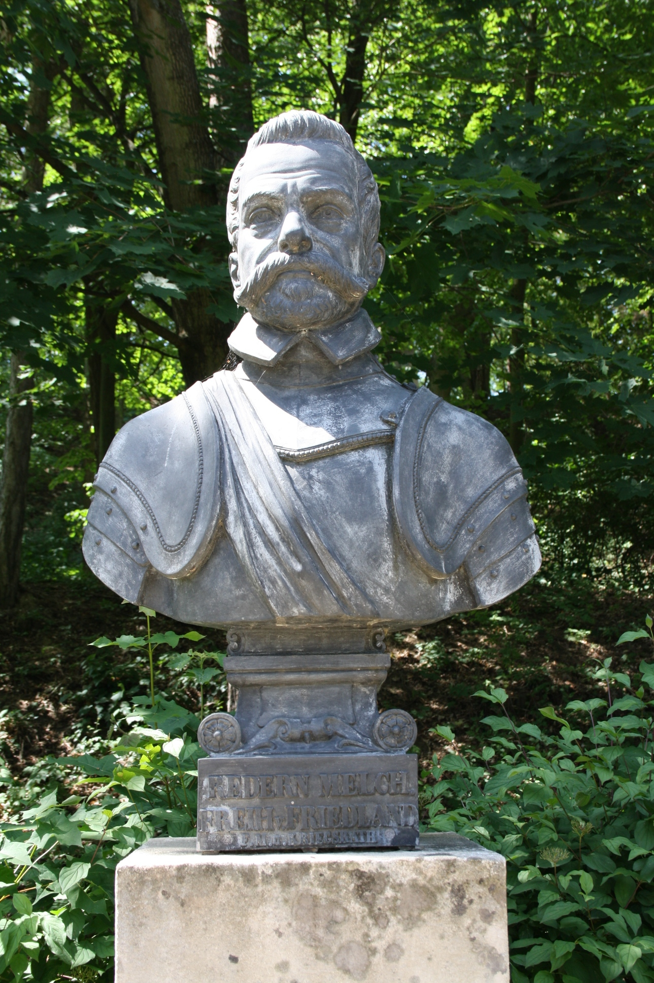 Büste von Melchior von Redern (Freiherr von Friedland, F.M.u.Kriegsrath) in der Gedenkstätte Heldenberg (Niederösterreich)